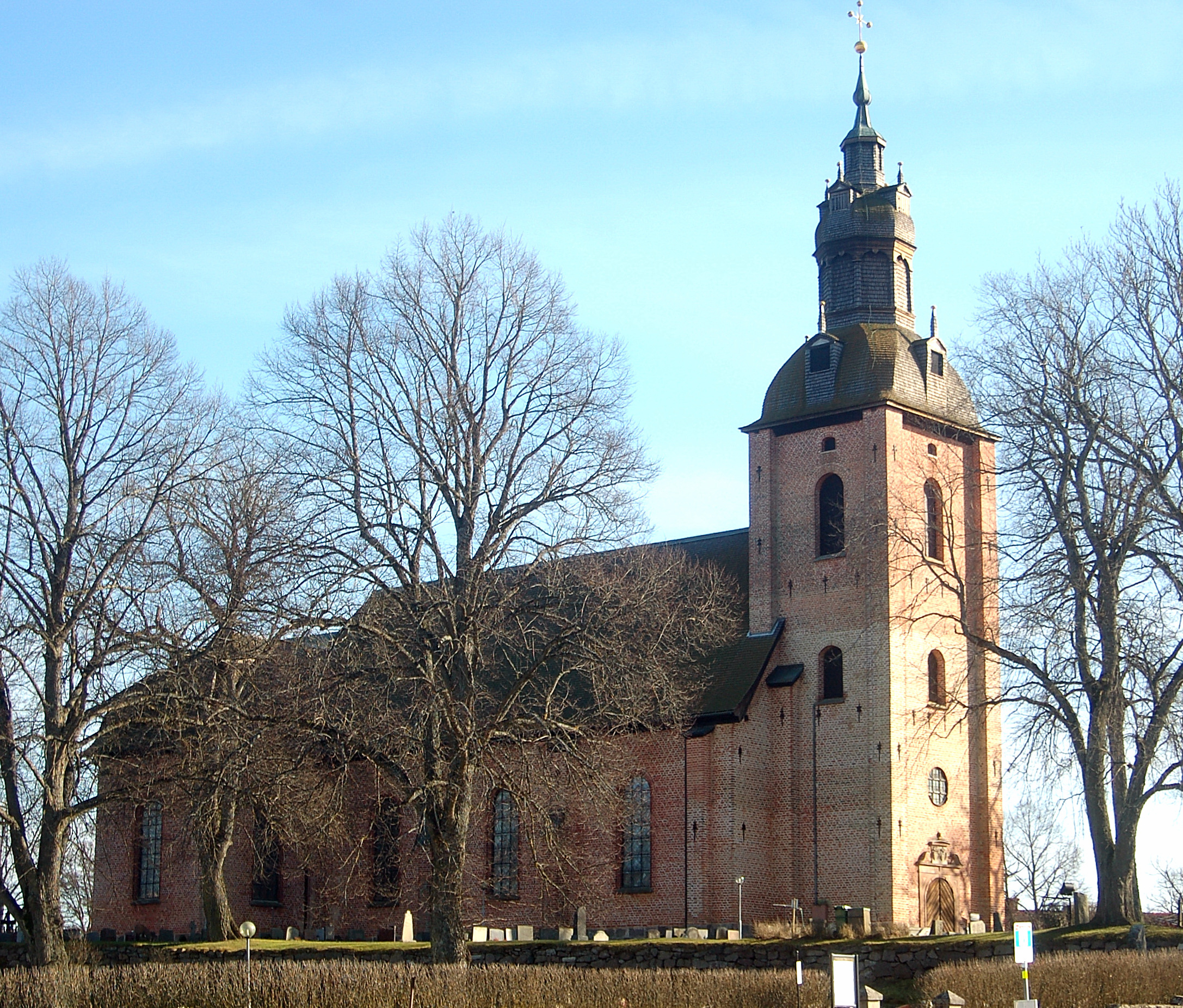 Askersunds landskyrka